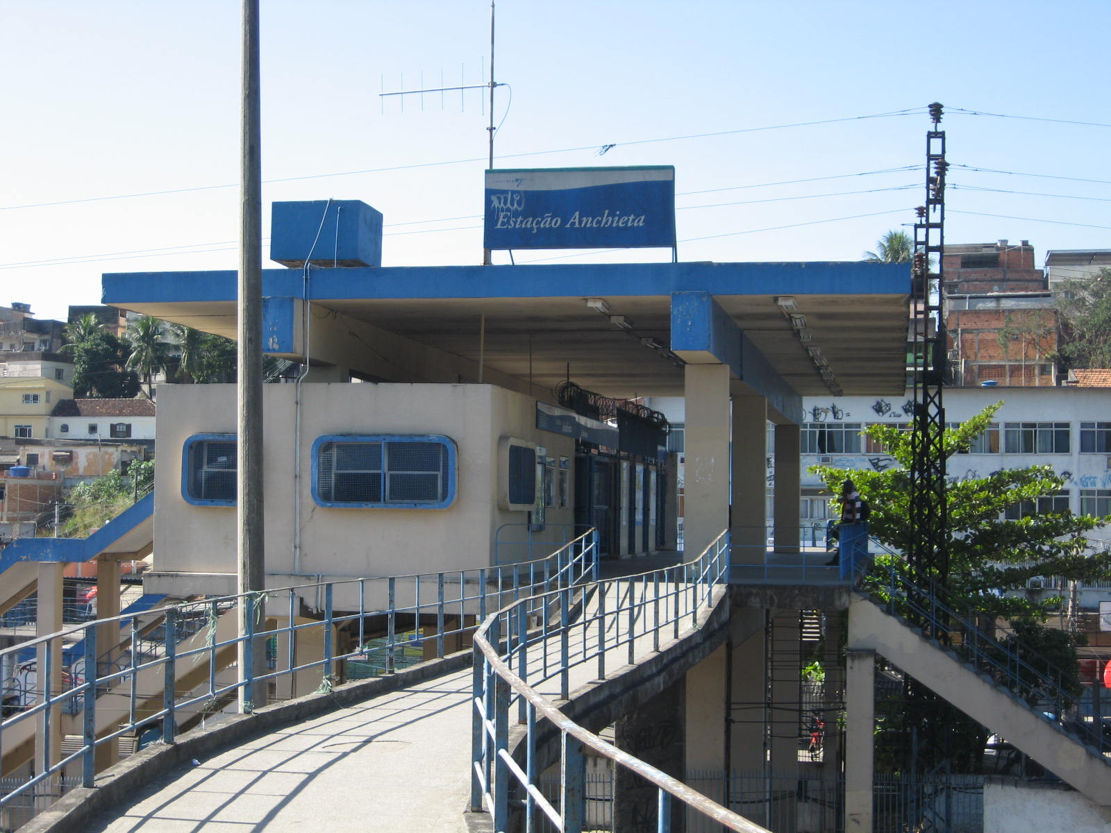 Estação de trem de Anchieta, ramal Central/Japeri.